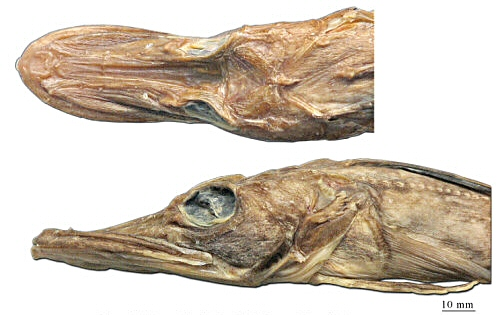 Head of Channichthys mithridatis Shandikov, 2009, dorsal and lateral views